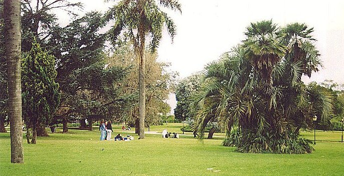 Descripción: Paseo del "Prado" en otoño, Montevideo (Uruguay) Fuente: Trabajo propio Fecha: 10/05/2002 Autor: NeMo